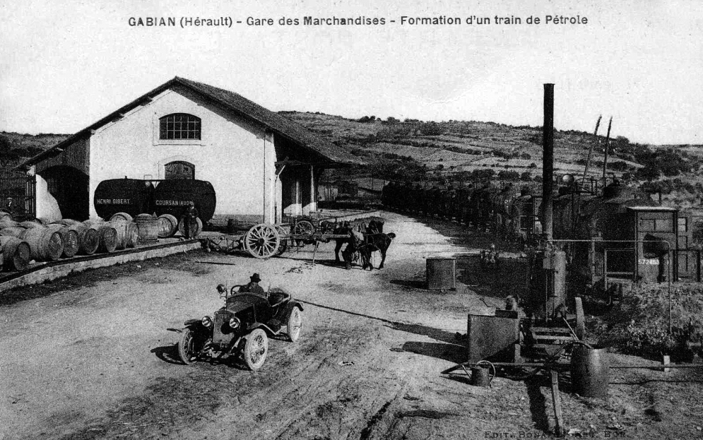 La gare marchandise de Gabian au début des années 1920, avec ses installations pour le transport du pétrole